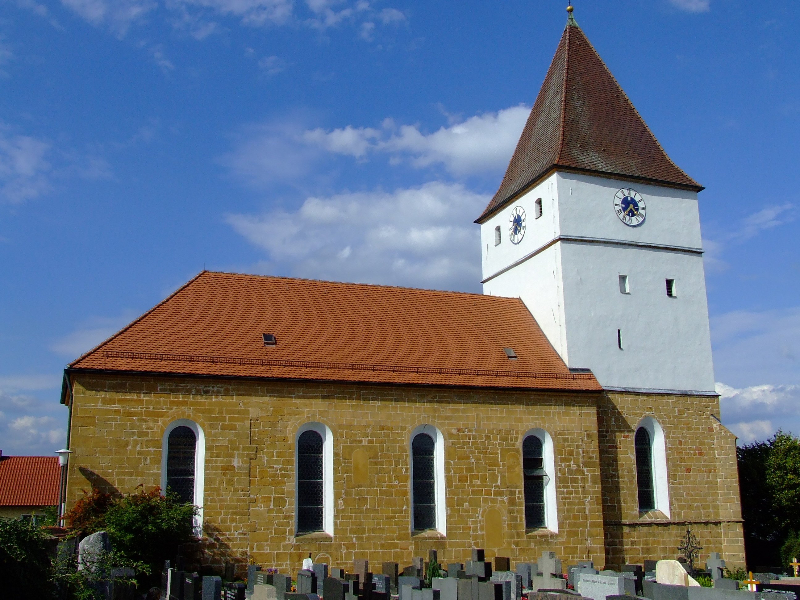 Die Pfarrkirche St. Johannes aus dem 12. Jhdt. in Großschönbrunn, Gemeinde Freihung, Kreis Amberg